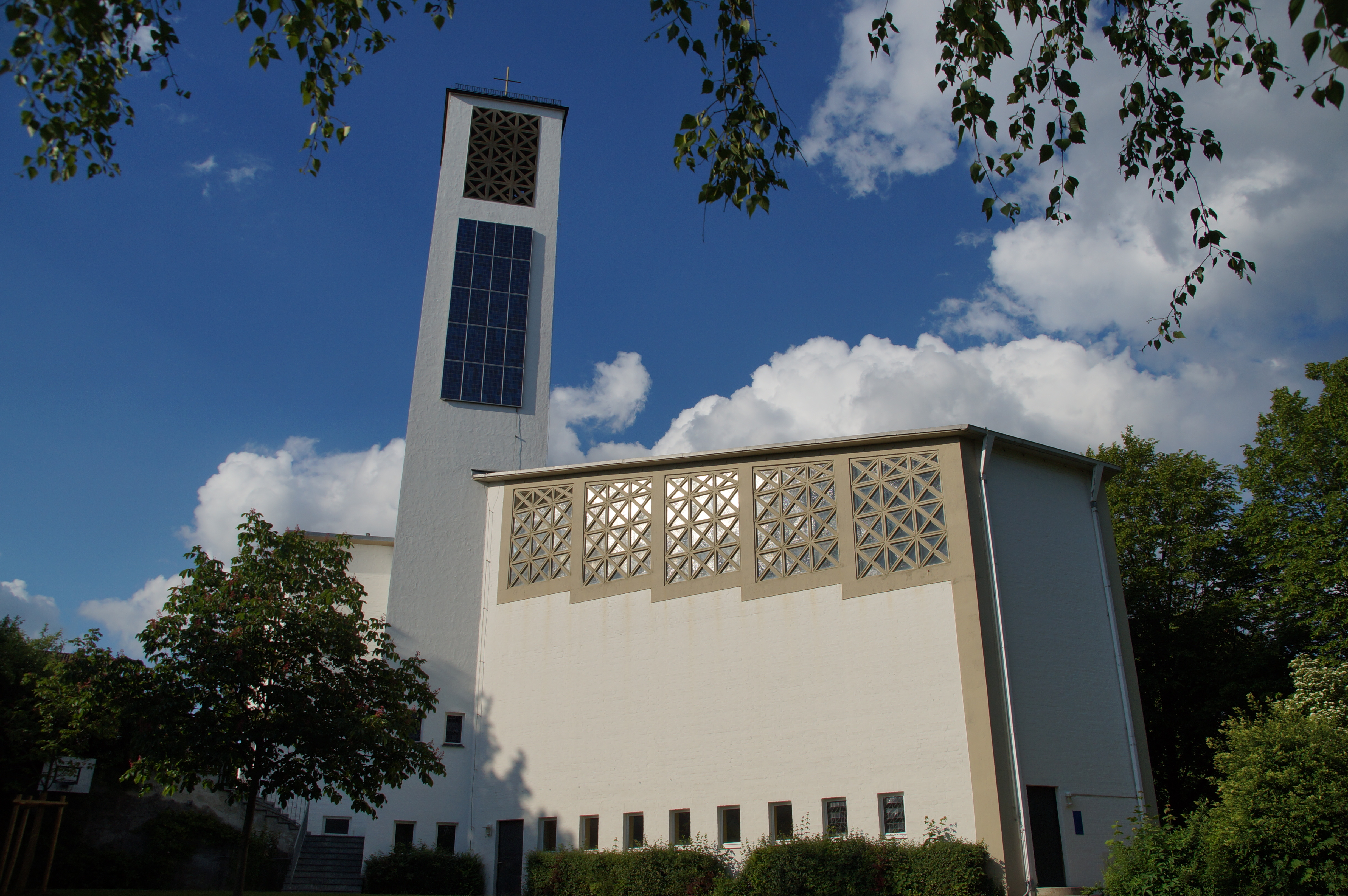 Die evangelisch-lutherische Pfarrkirche St. Lukas steht am Hiltnerweg 3 im Stadtteil Konradsiedlung von Regensburg.